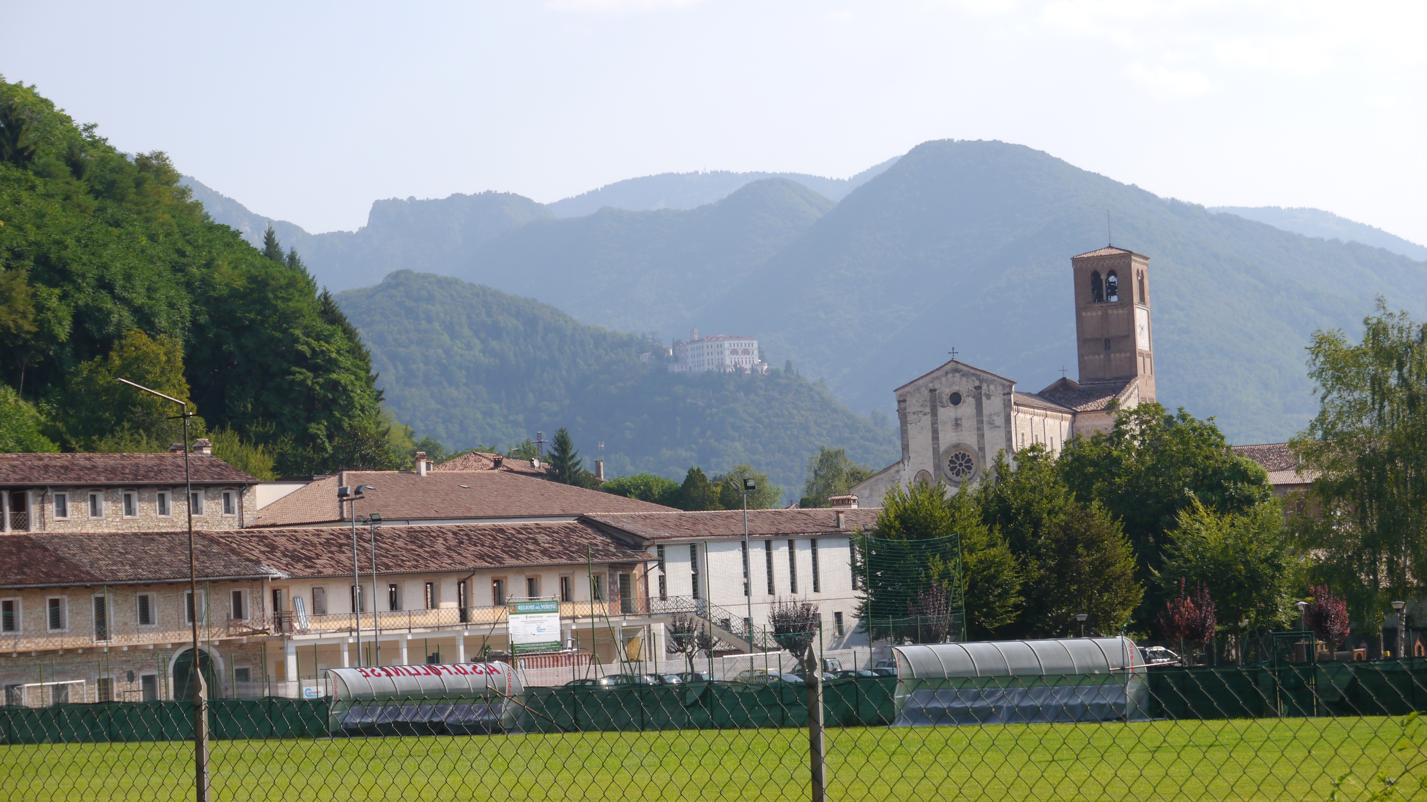 A sinistra il collegio S. Giuseppe, al centro la Basilica e sullo sfondo il castello Brandolini